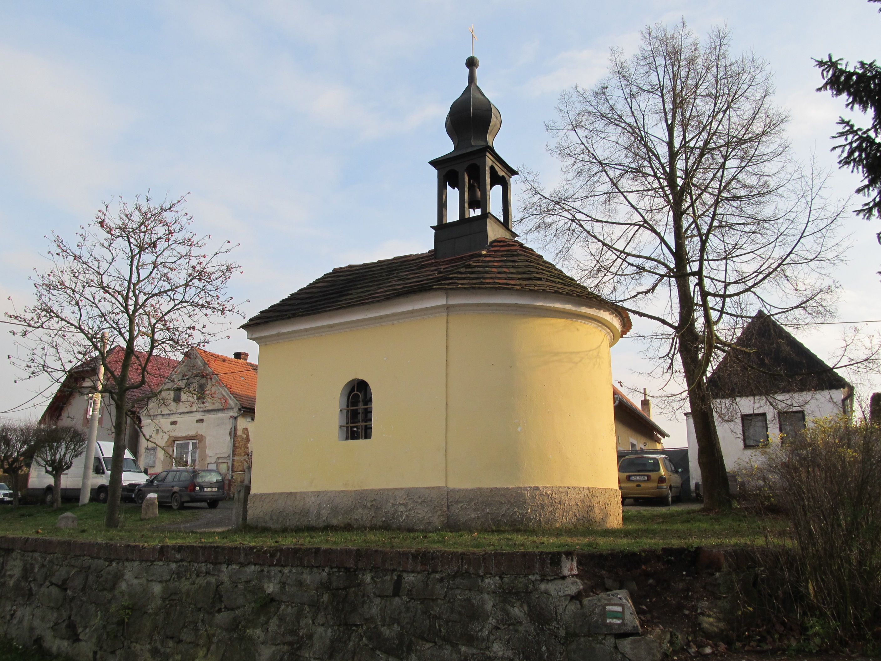 Mantov - kaplička